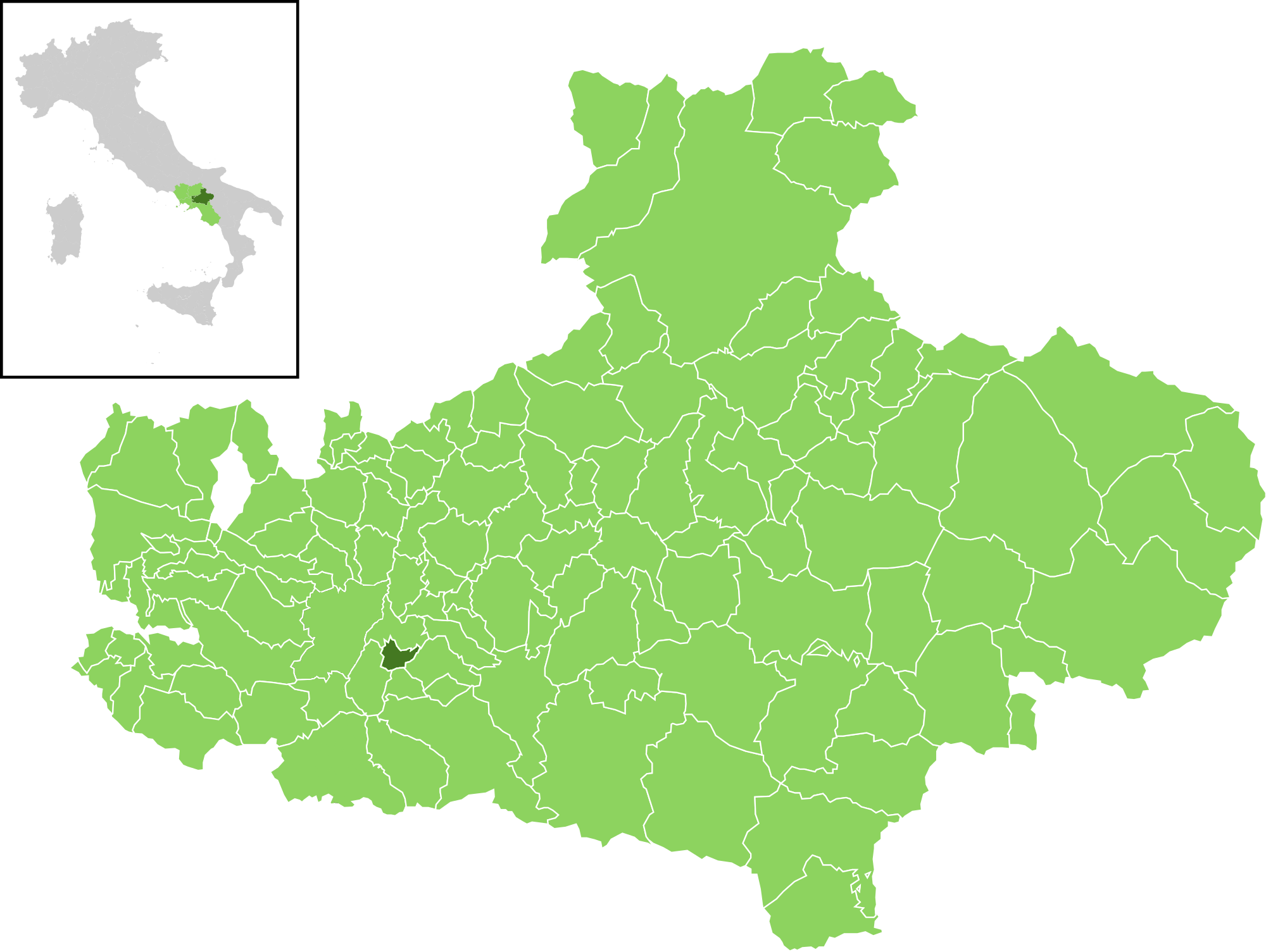 Il comune all'interno della provincia di Avellino